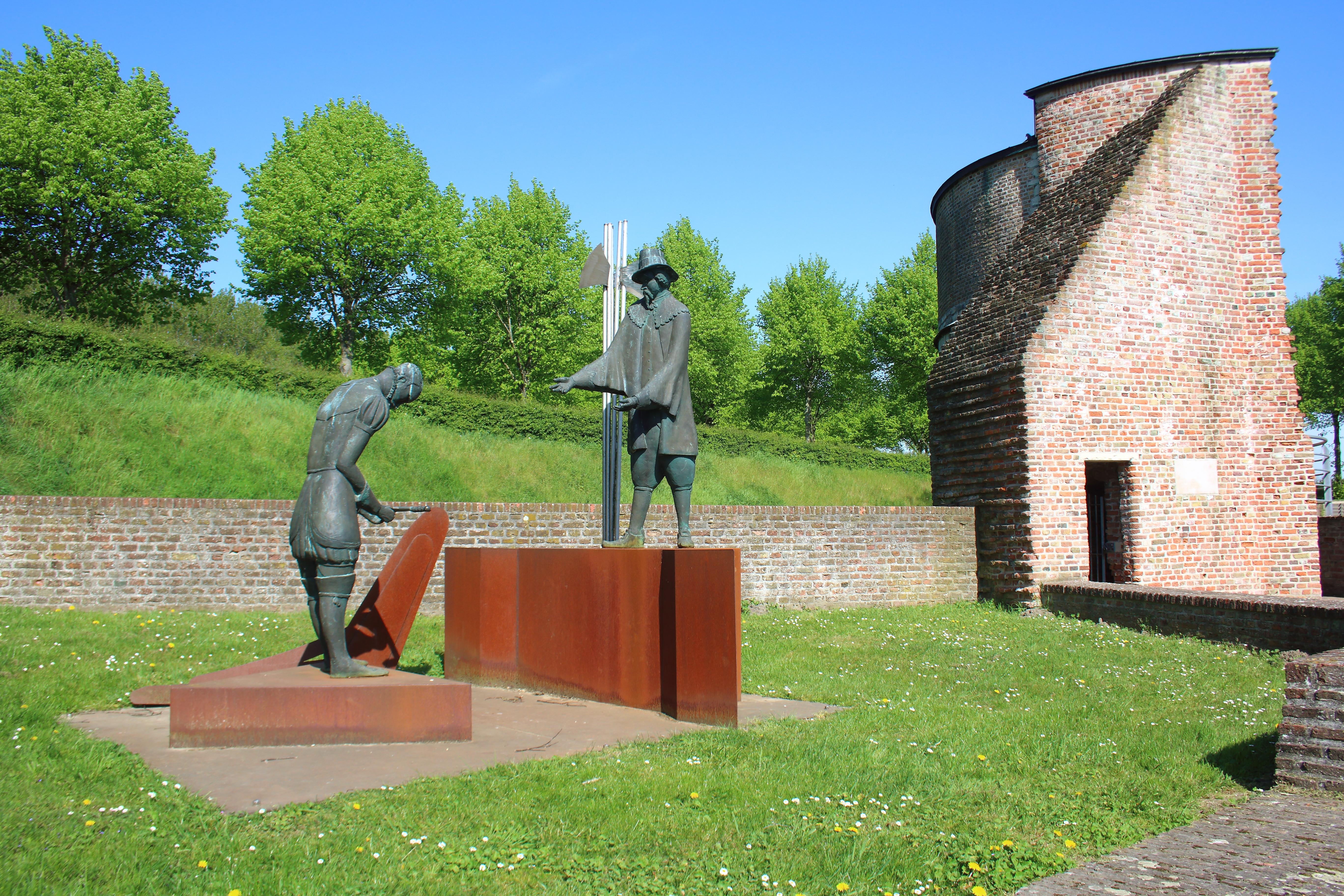 Keldermanspoort, Hulst, Zeeuws-Vlaanderen, Zeeland, Nederland